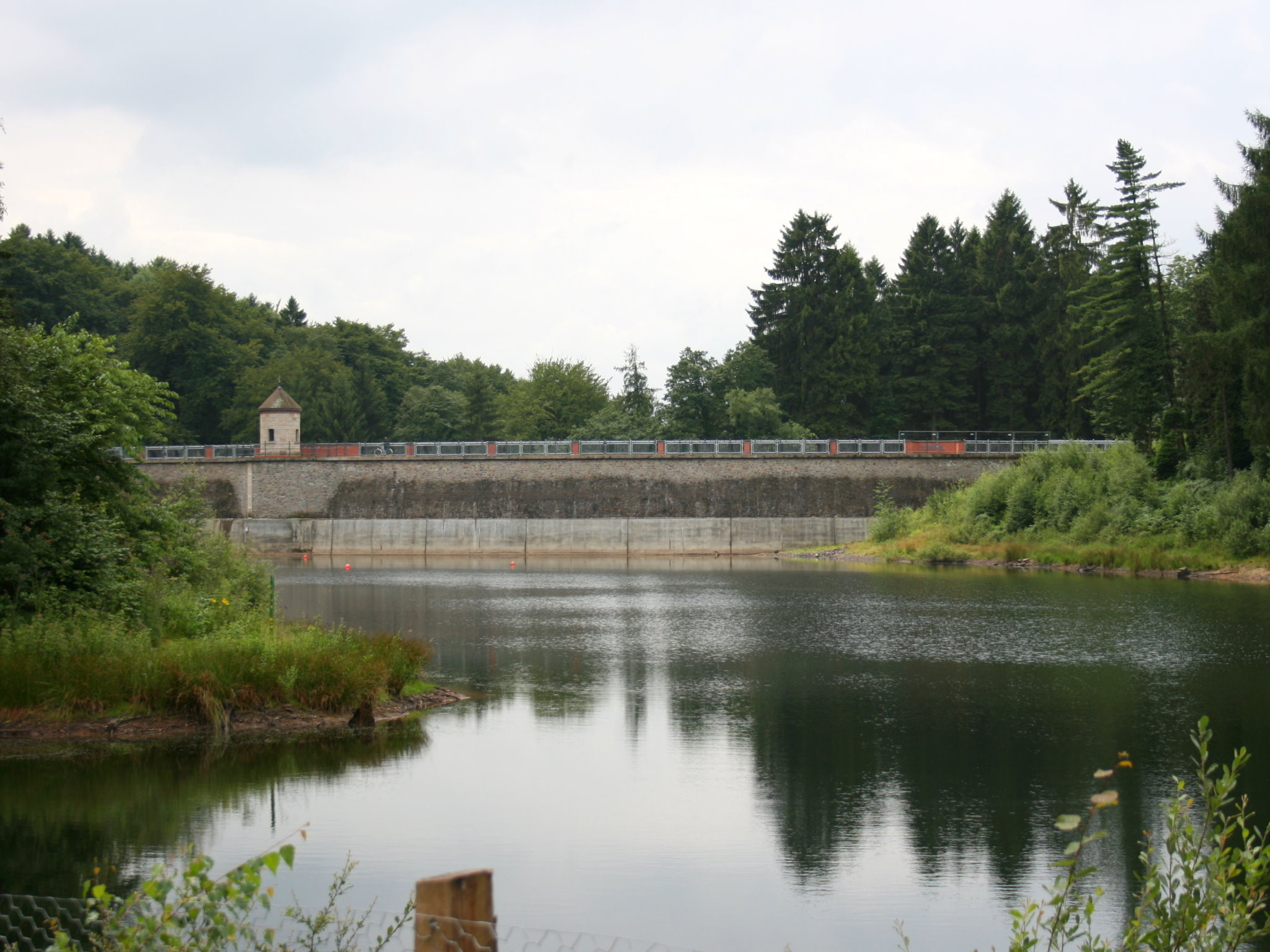 Wuppertal-Ronsdorf: Ronsdorfer Talsperre